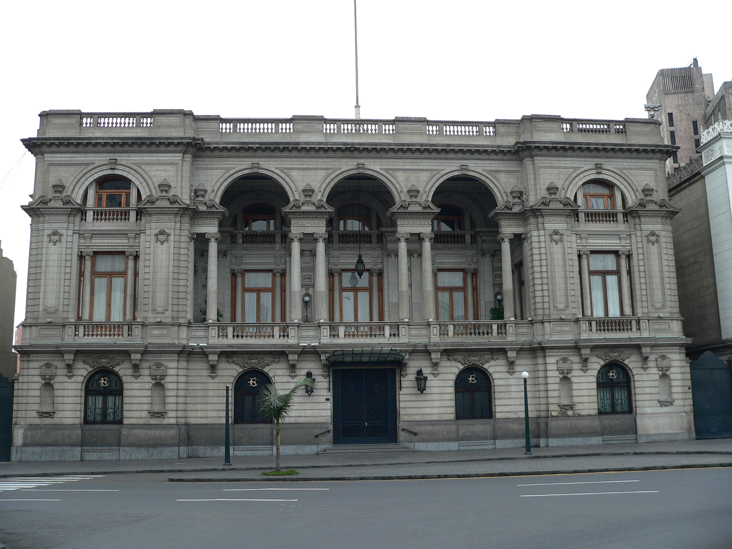 Descripción: Club Nacional Lugar: Centro Histórico de Lima Distrito : Cercado de Lima Ciudad : Lima País : Perú Fotógrafo: © Manuel González Olaechea y Franco Fecha de la foto : 8 de julio de 2007